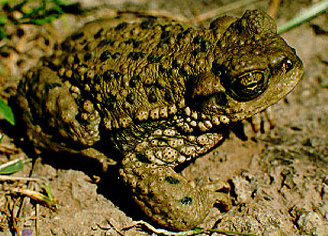 Bufo achalensis